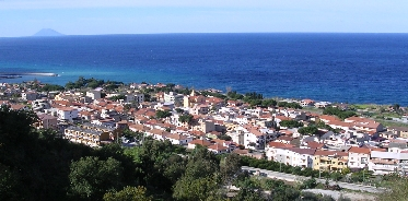 Andrea B. Calzona, , Parghelia, Pubblico dominio: fatta da me